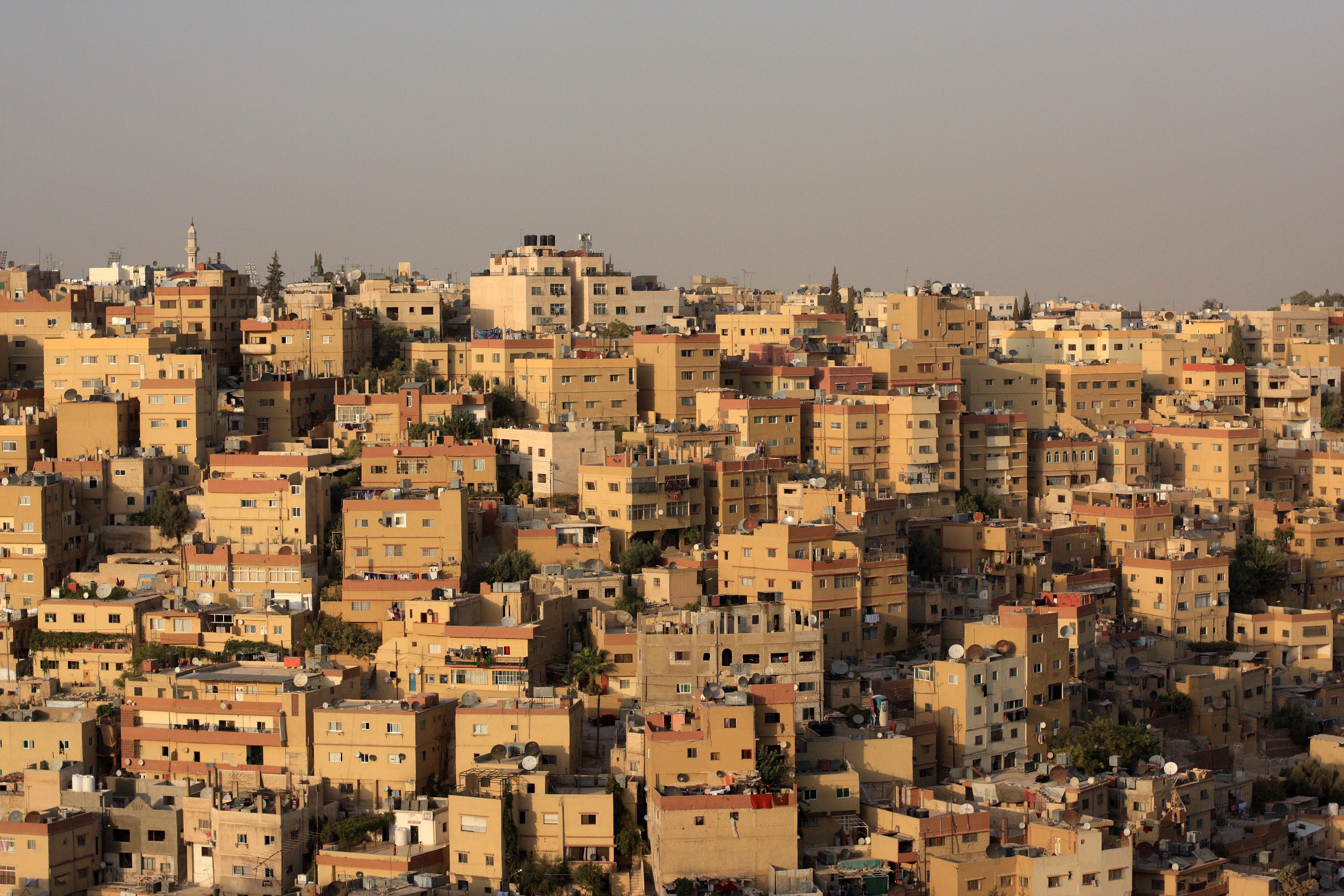 Amman Citadel